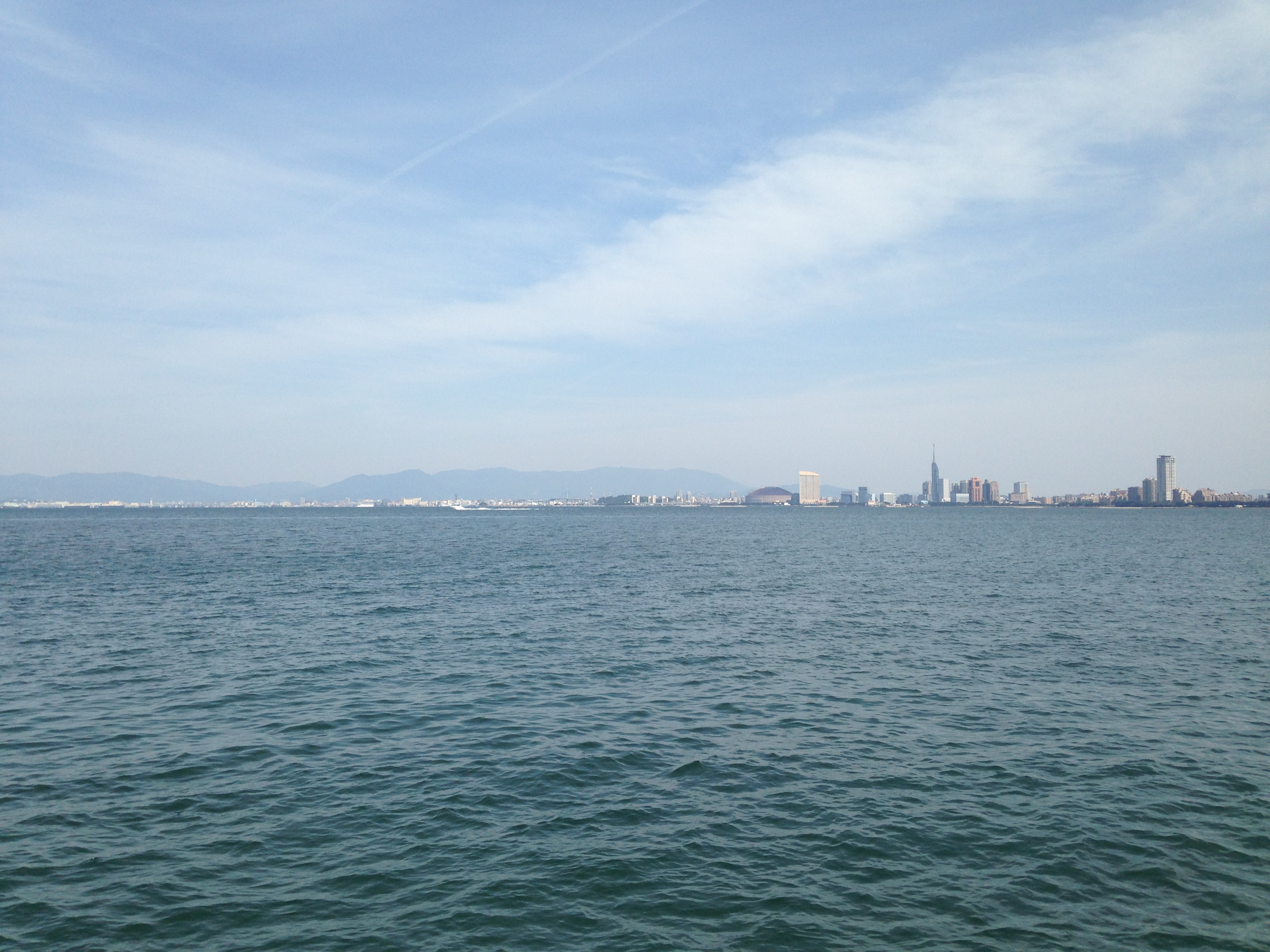 能古島より望む博多湾と福岡市内